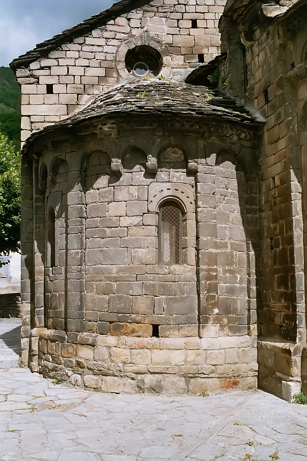 Espagne - Val d'Aran - Église de l'Assomption de Bossòst